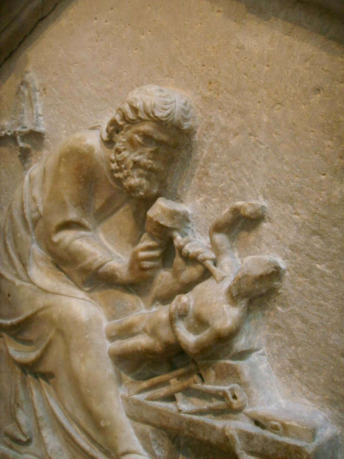 Formella 17, fidia o la scultura, andrea pisano, 1334-1336 dettaglio